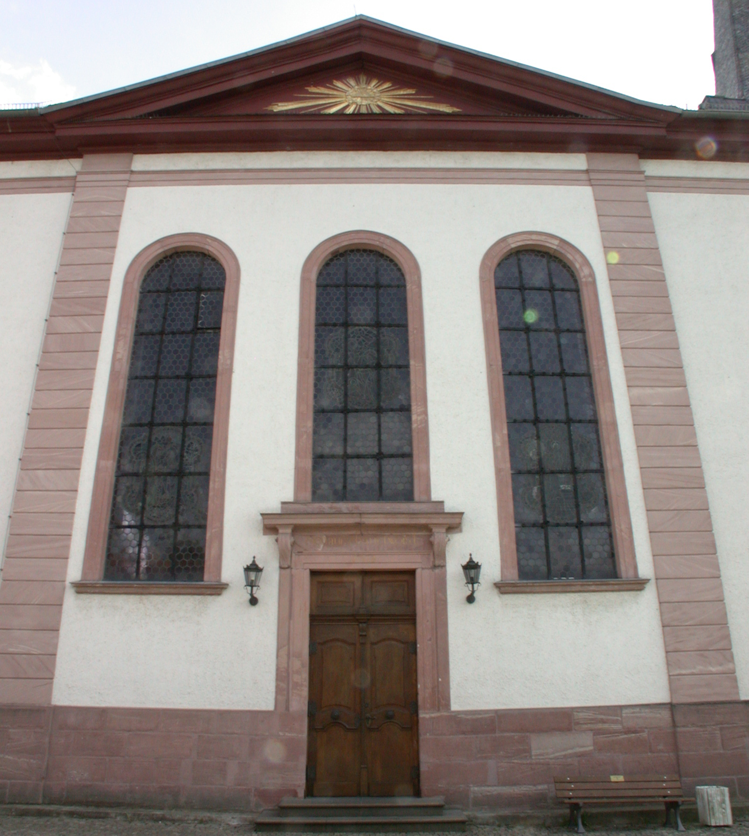 Seitenportal der katholischen Pfarrkirche St. Peter und Paul, Bad Camberg, Deutschland